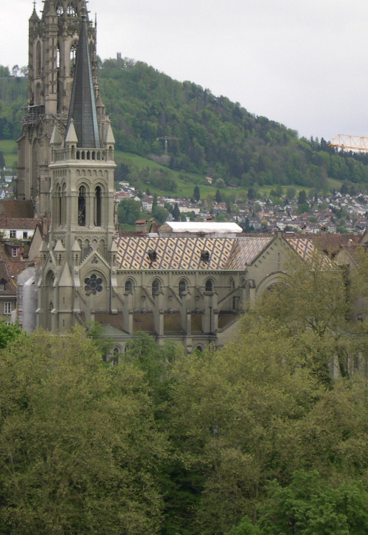 Die Kirche St. Peter und Paul in Bern (im Hintergrund der Turm des Berner Münsters)